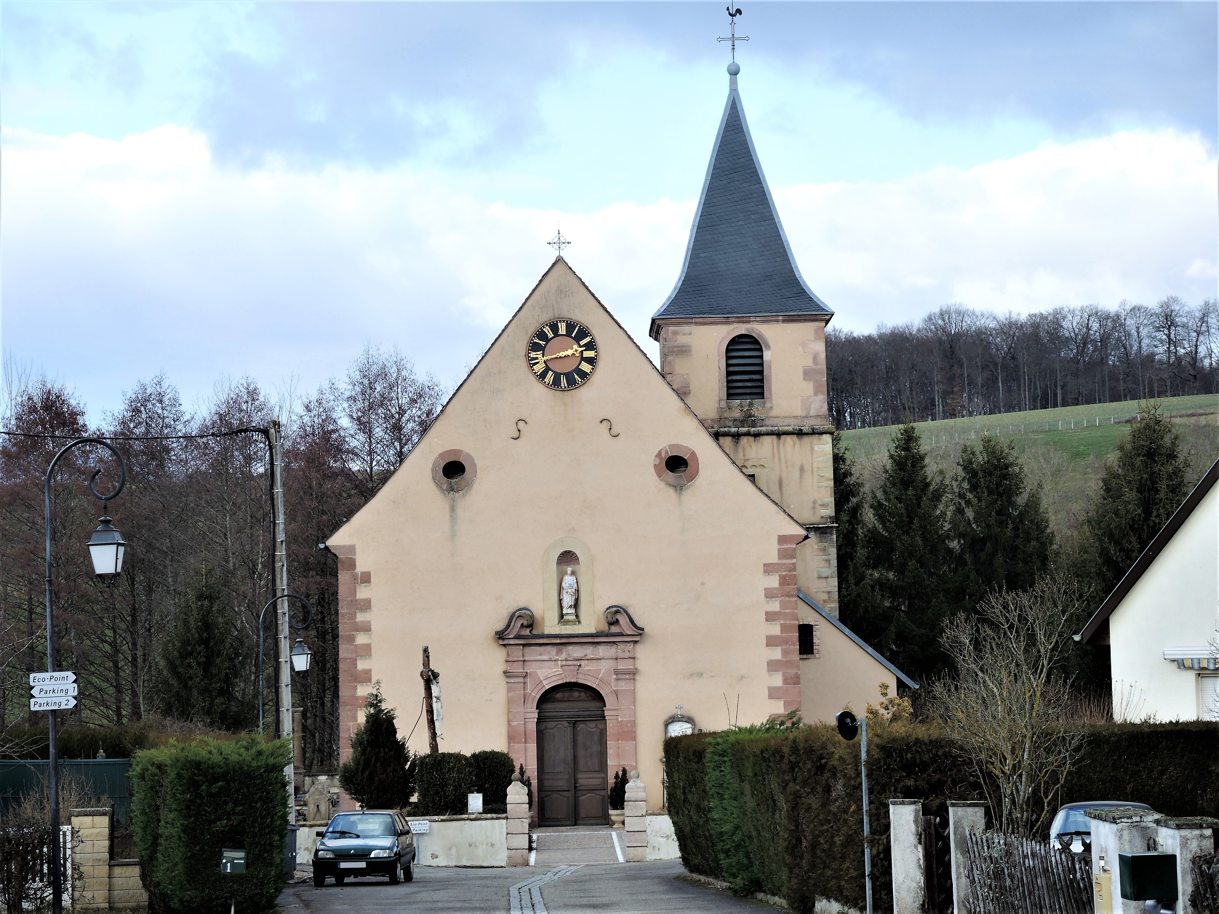 Eglise Sainte-Marguerite de Soppe-le-Haut. Haut-Soulzbach. Haut-Rhin.